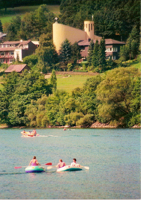 Katholische Kirche St. Peter am See, Hunswinkel (Listertalsperre) bei Meinerzhagen. Architekt: Hans Schilling